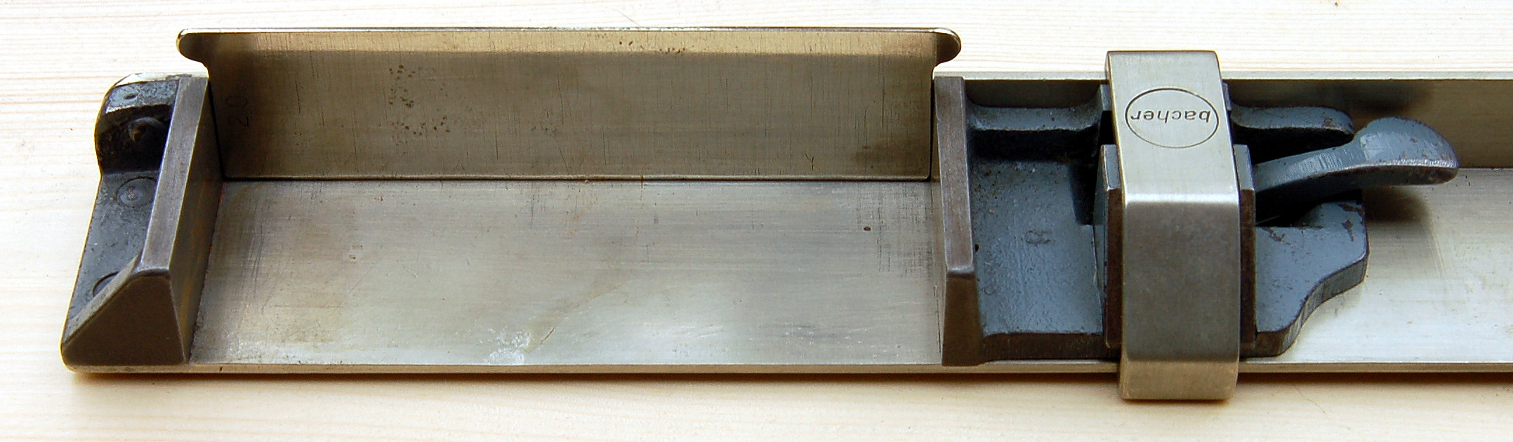 Setzlinie für Winkelhaken (Schriftsetzer-Hilfsmittel)